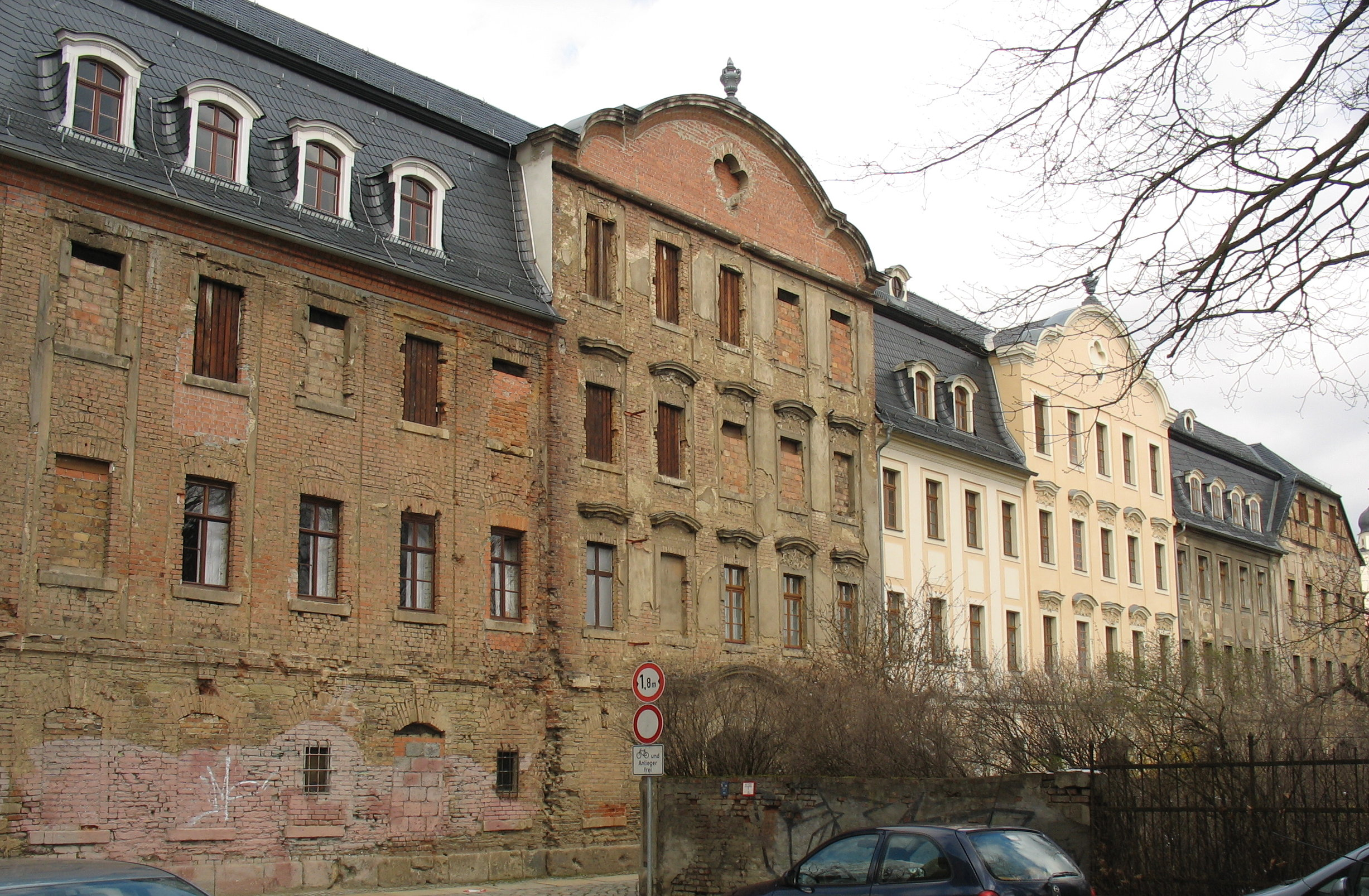 Weisbachsches Haus in Plauen von der Böhlerstraße aus gesehen